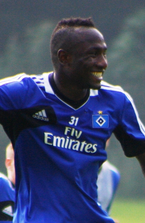 Jacques Zoua beim HSV-Training am 25. Juli 2013.